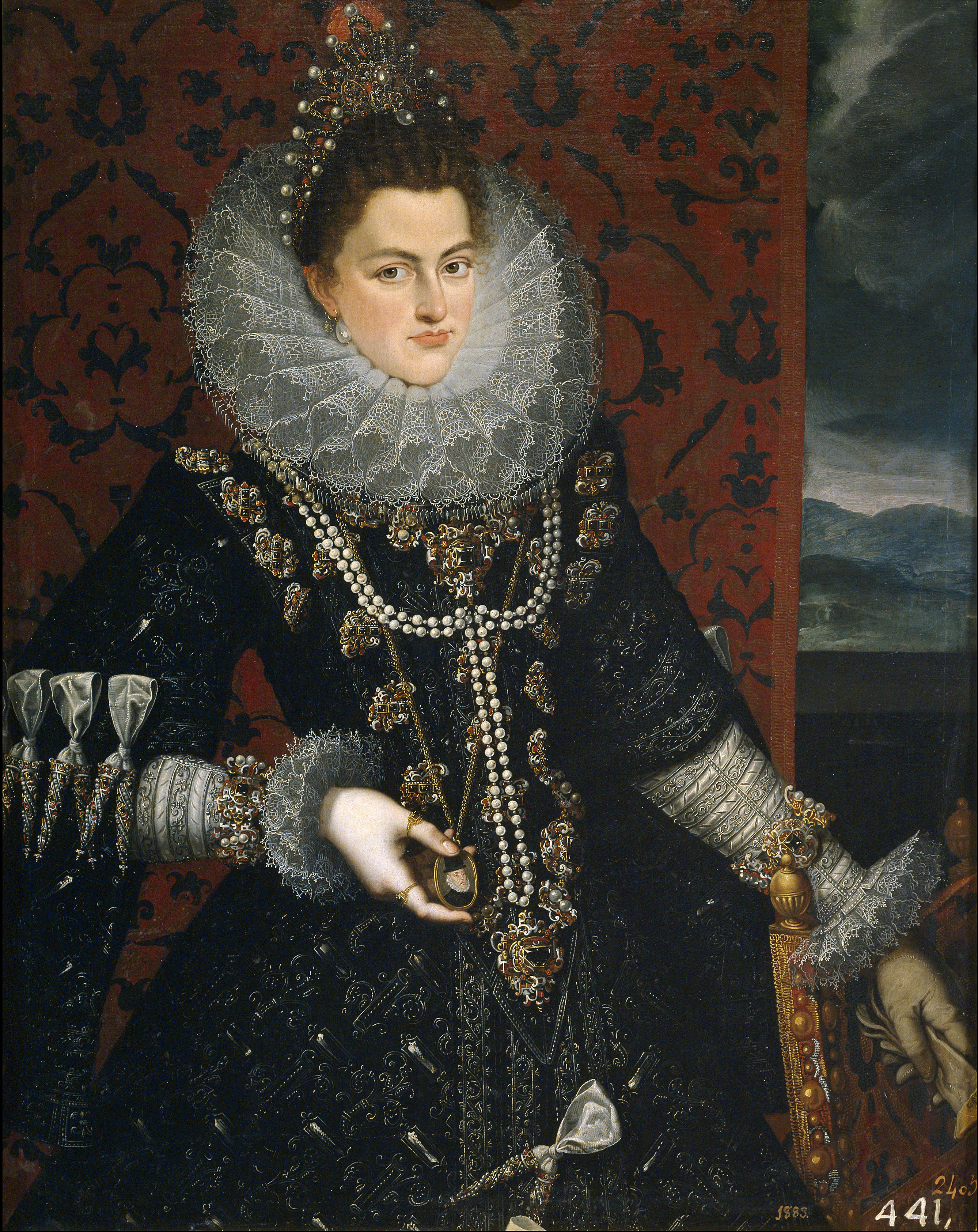 Retrato de la infanta Isabel Clara Eugenia (1566-1633), que fue hija del rey Felipe II de España, esposa del archiduque Alberto de Austria y también soberana y posteriormente gobernadora de los Países Bajos.